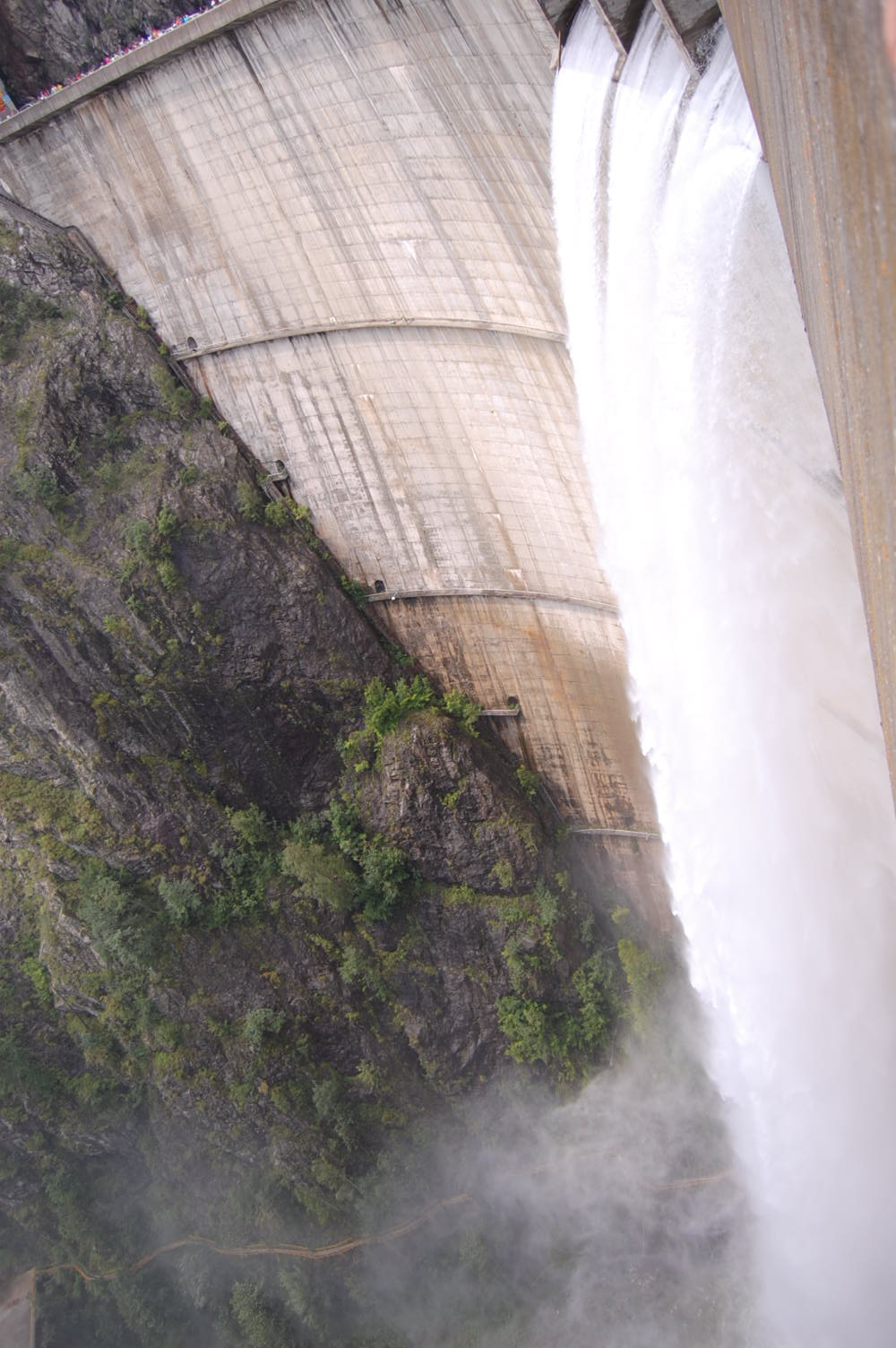 no original description